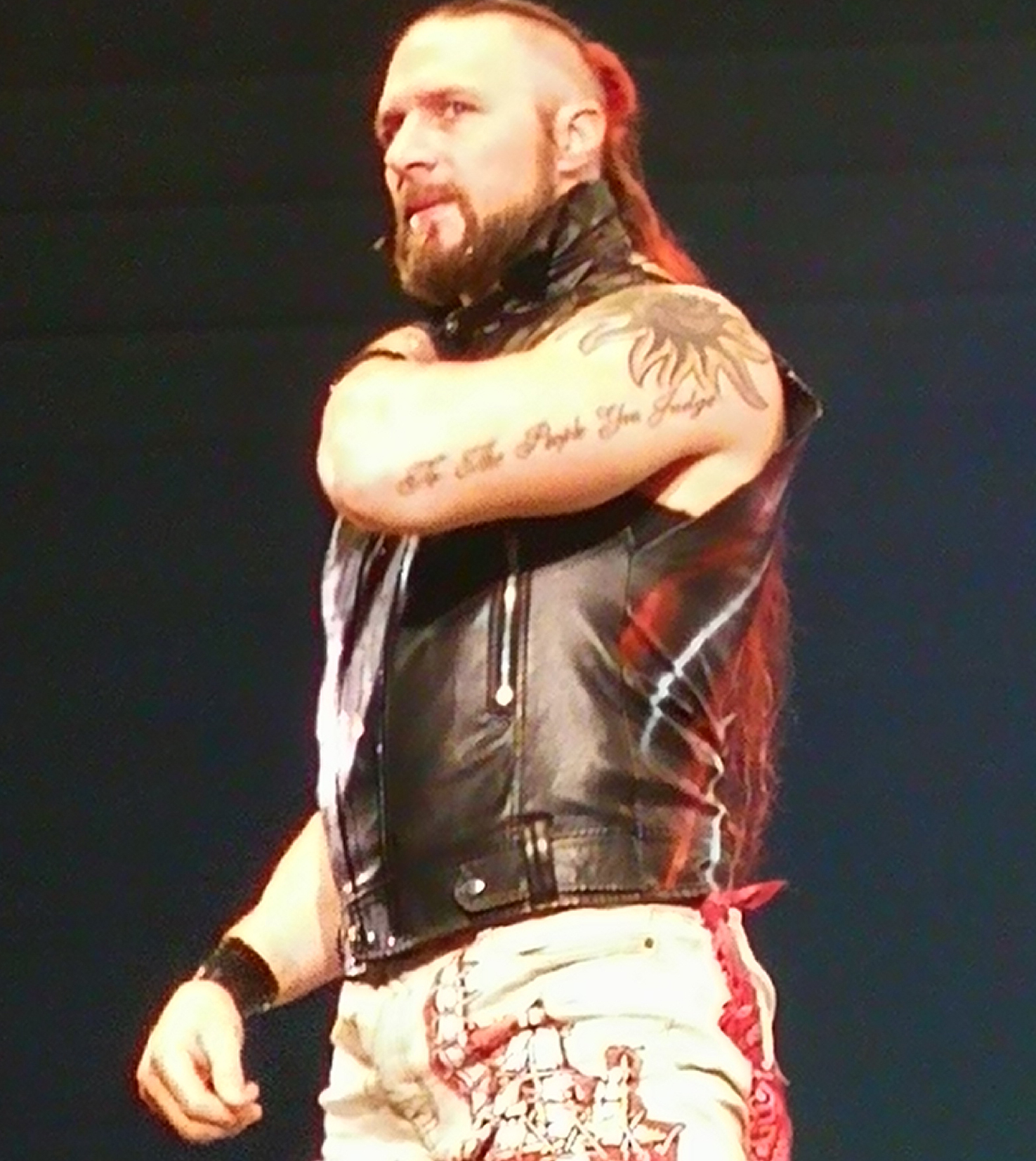 2019年8月4日 大阪・大阪府立体育会館（エディオンアリーナ大阪） ランス・アーチャー